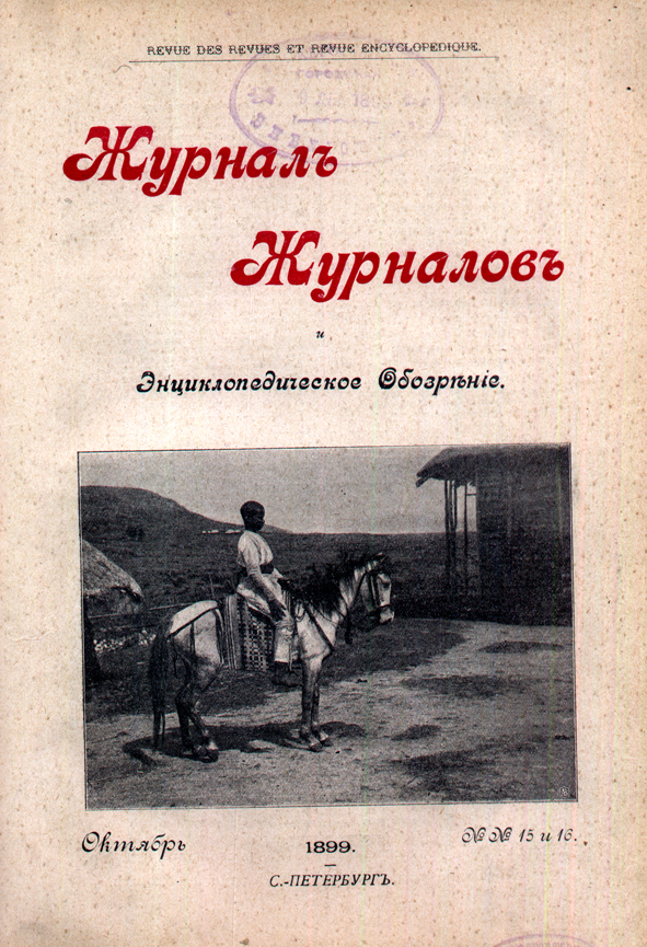 "Журнал журналов", обложка журнала